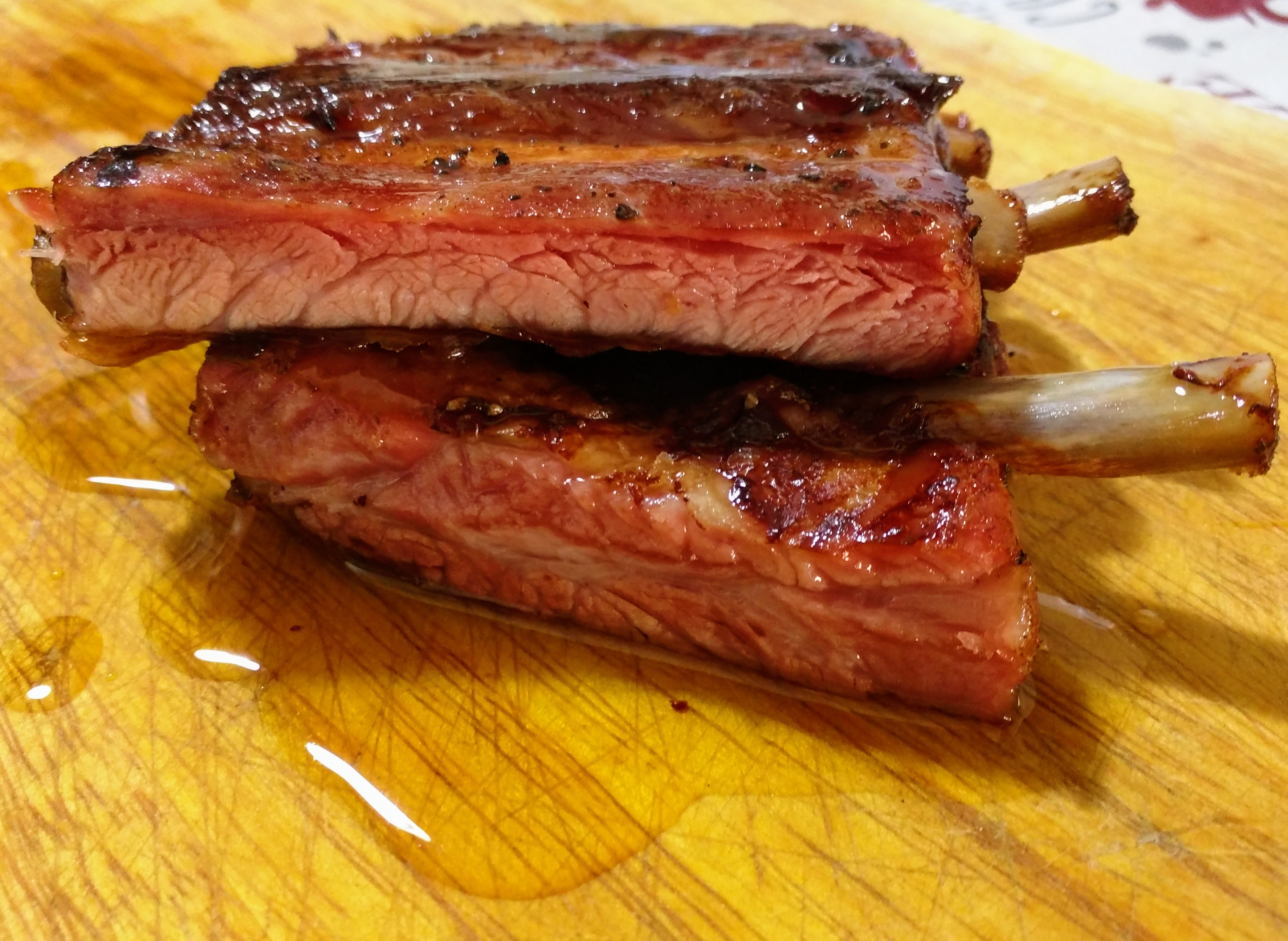 rosticciana